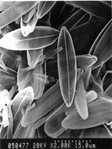 Pennate diatom in valve view